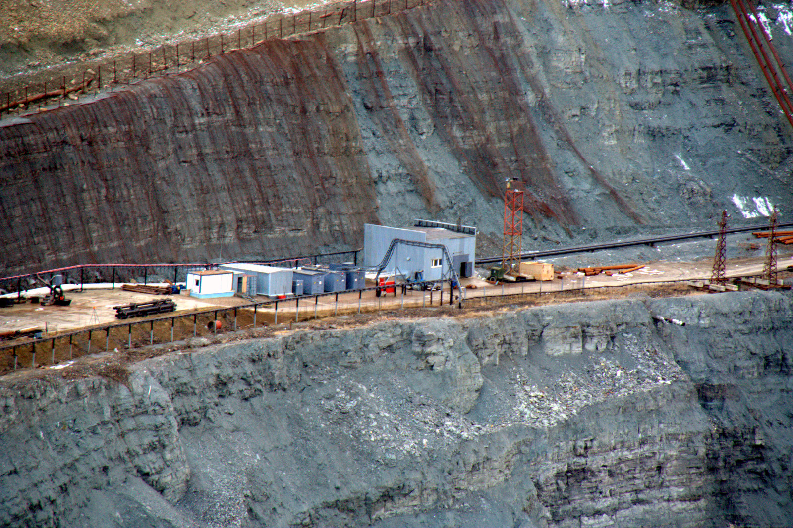 Abstiegstechnik zum Grund des Tieftagebaus.